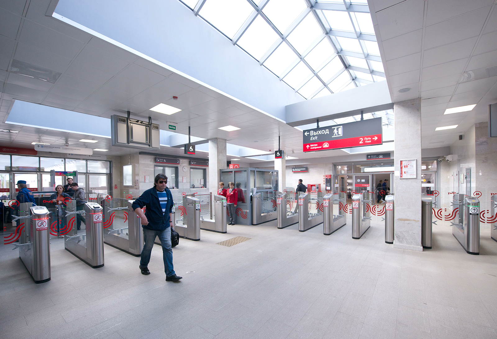 Платформа Шелепиха МЦК. Турникеты